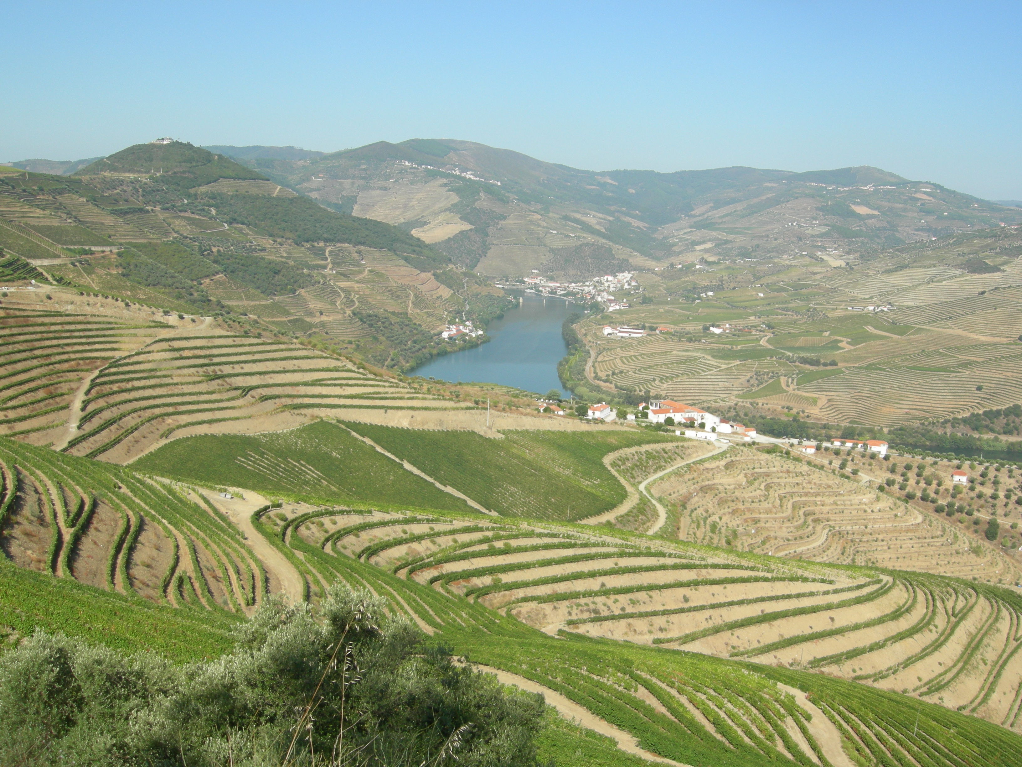 Depois de Alijó, depara-se com uma bela paisagem do Alto Douro Vinhateiro